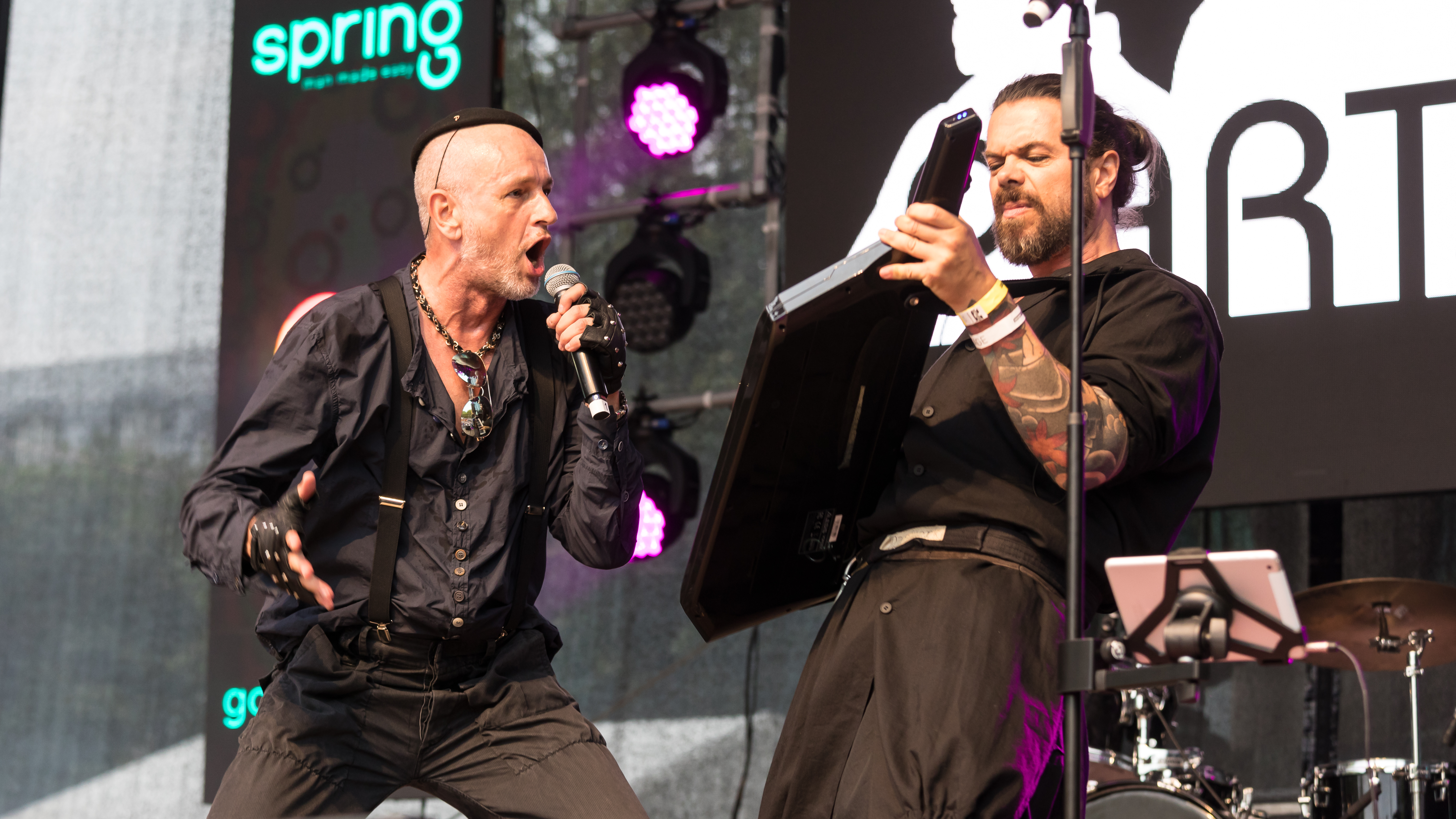 ColognePride 2019-Samstag-Hauptbühne-1940-Part of the Art - Carsten Düsener und Stephan Runge